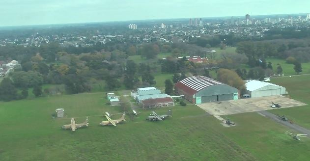 Imagen aérea del Aeródromo Militar de Campo de Mayo pueden verse los 3 Fiat G222 dados de baja y a la espera de su destino final.